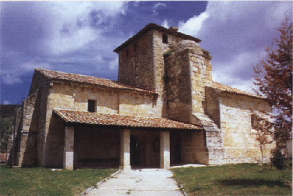 Panorámica de la Iglesia de Santa Eulalia